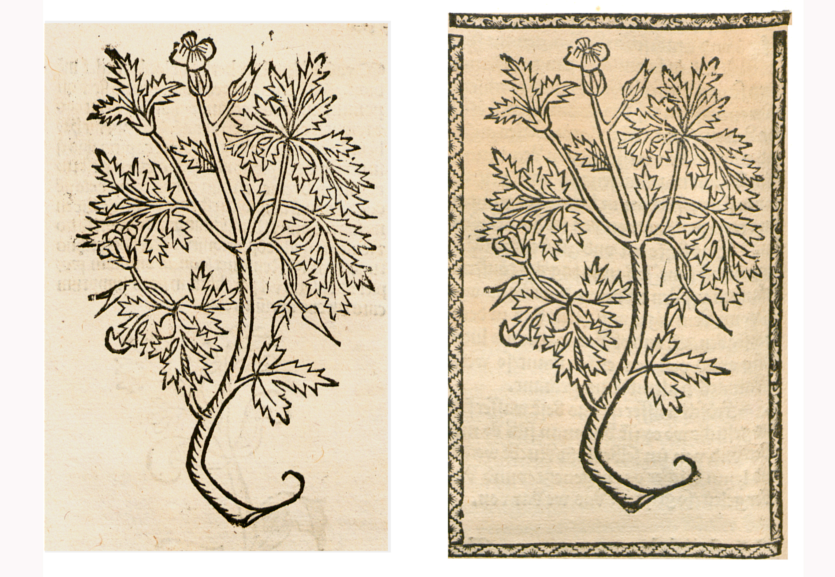 Abbildung von: Gottsgenad (Geranium robertianum)